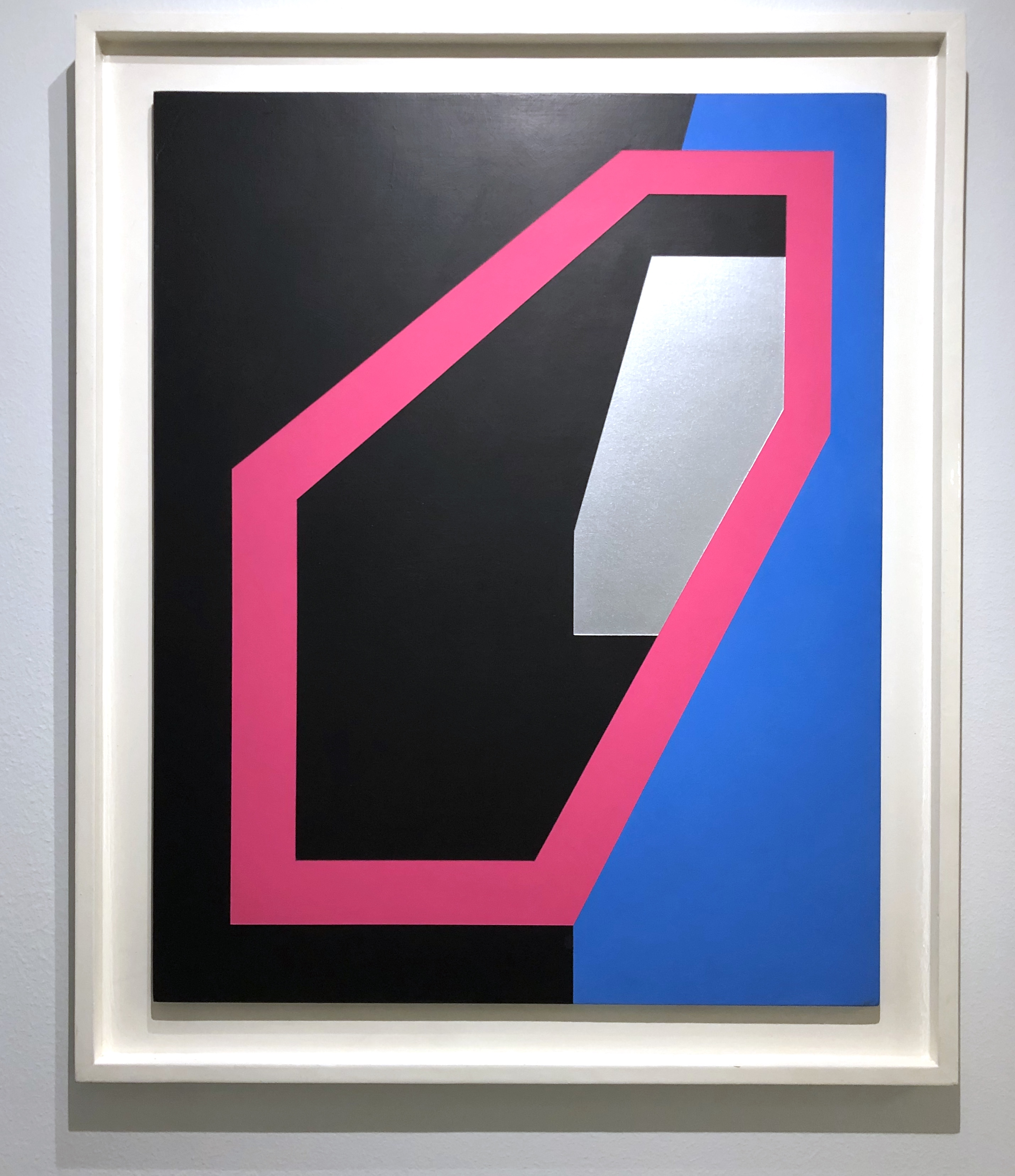 Akryylimaalaus levylle. Koko: 60 x 74 cm, yksityiskokoelma